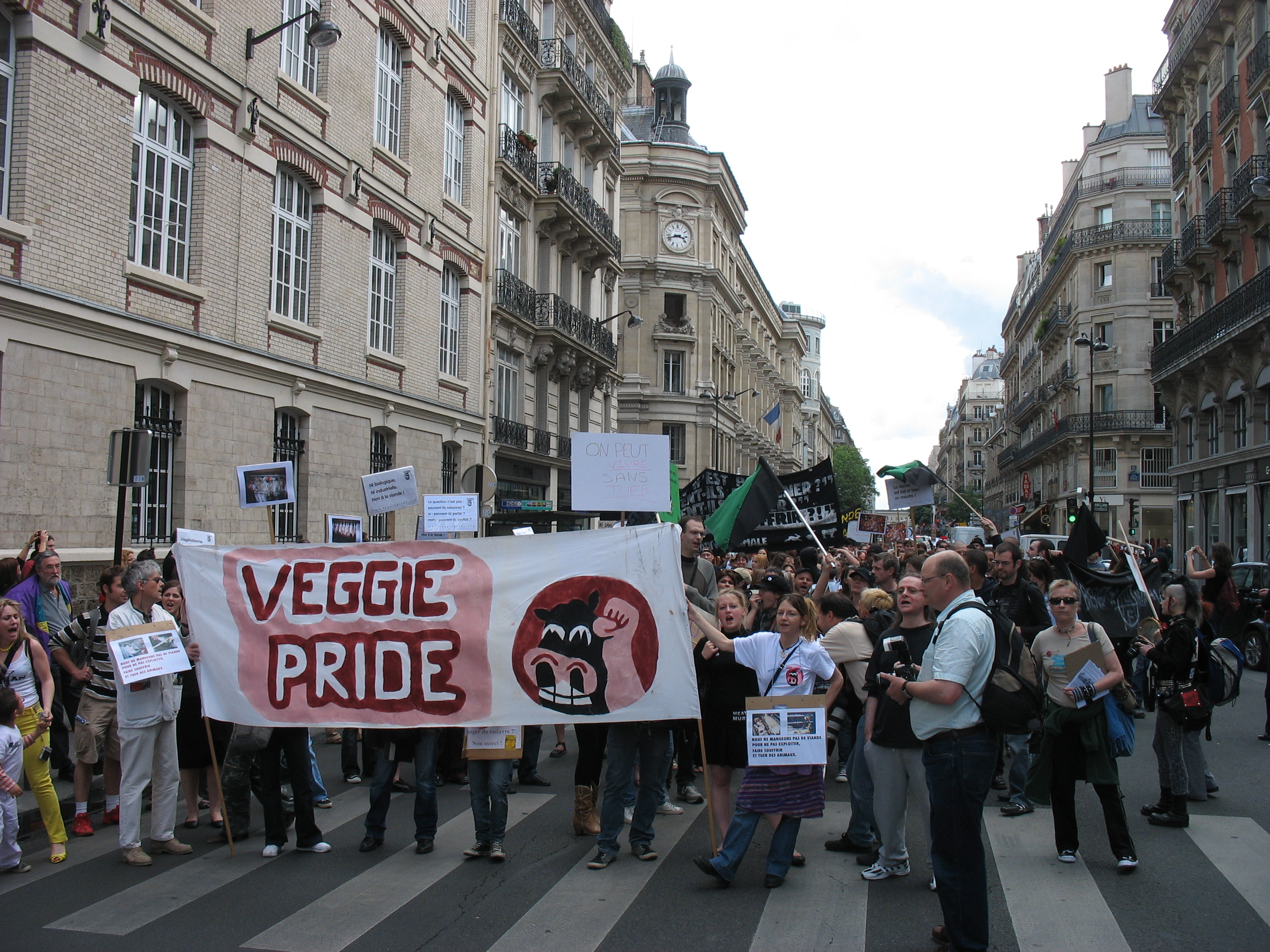 Veggie Pride. 2008. Paris.